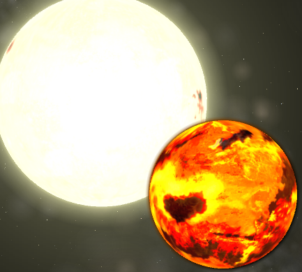 zelf gemaakt met behulp van celestia: Alpha Centauri Bb.